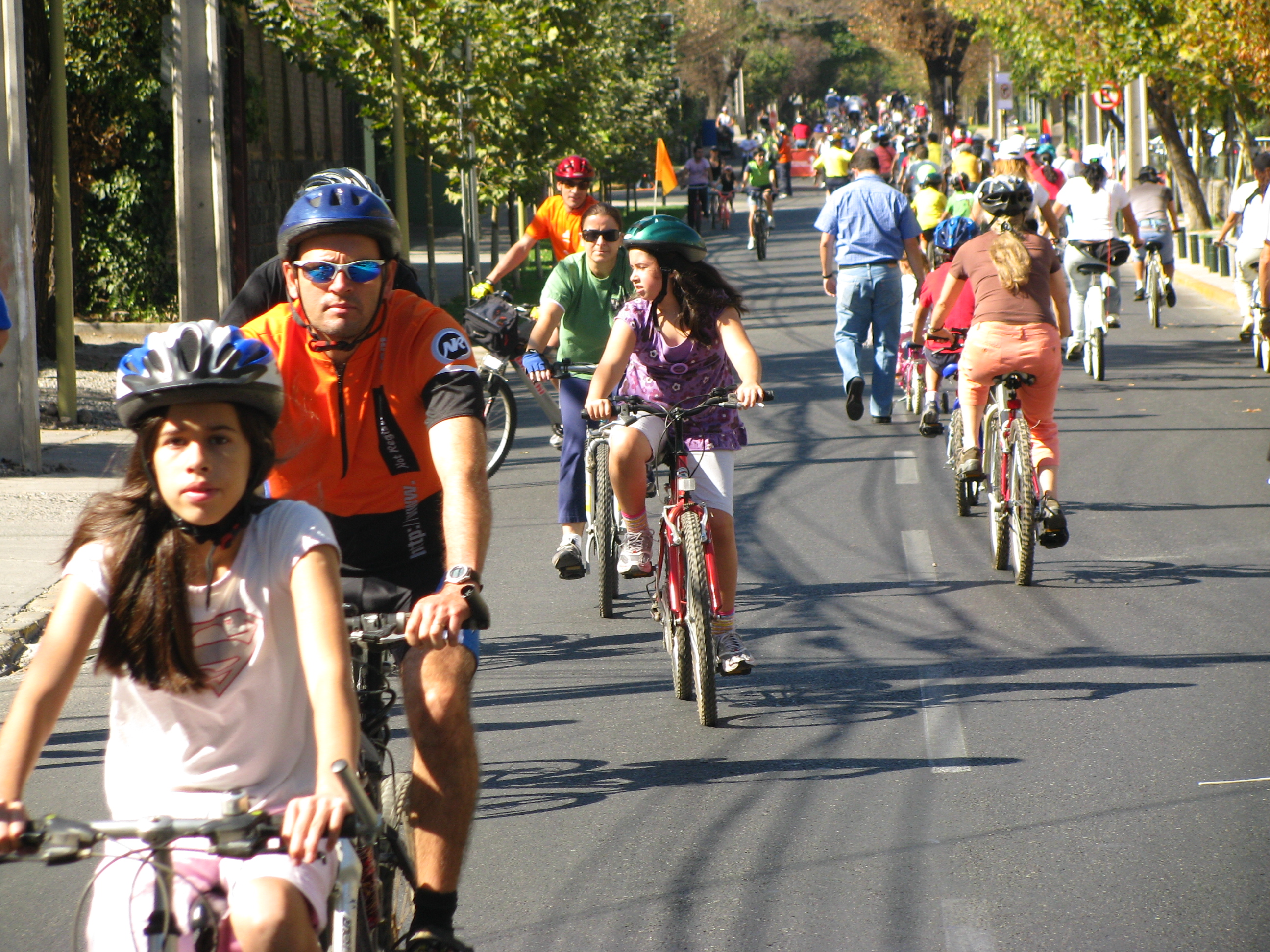 Ciclorecreovía comuna de Las Condes. Región Metropolitana, Chile.